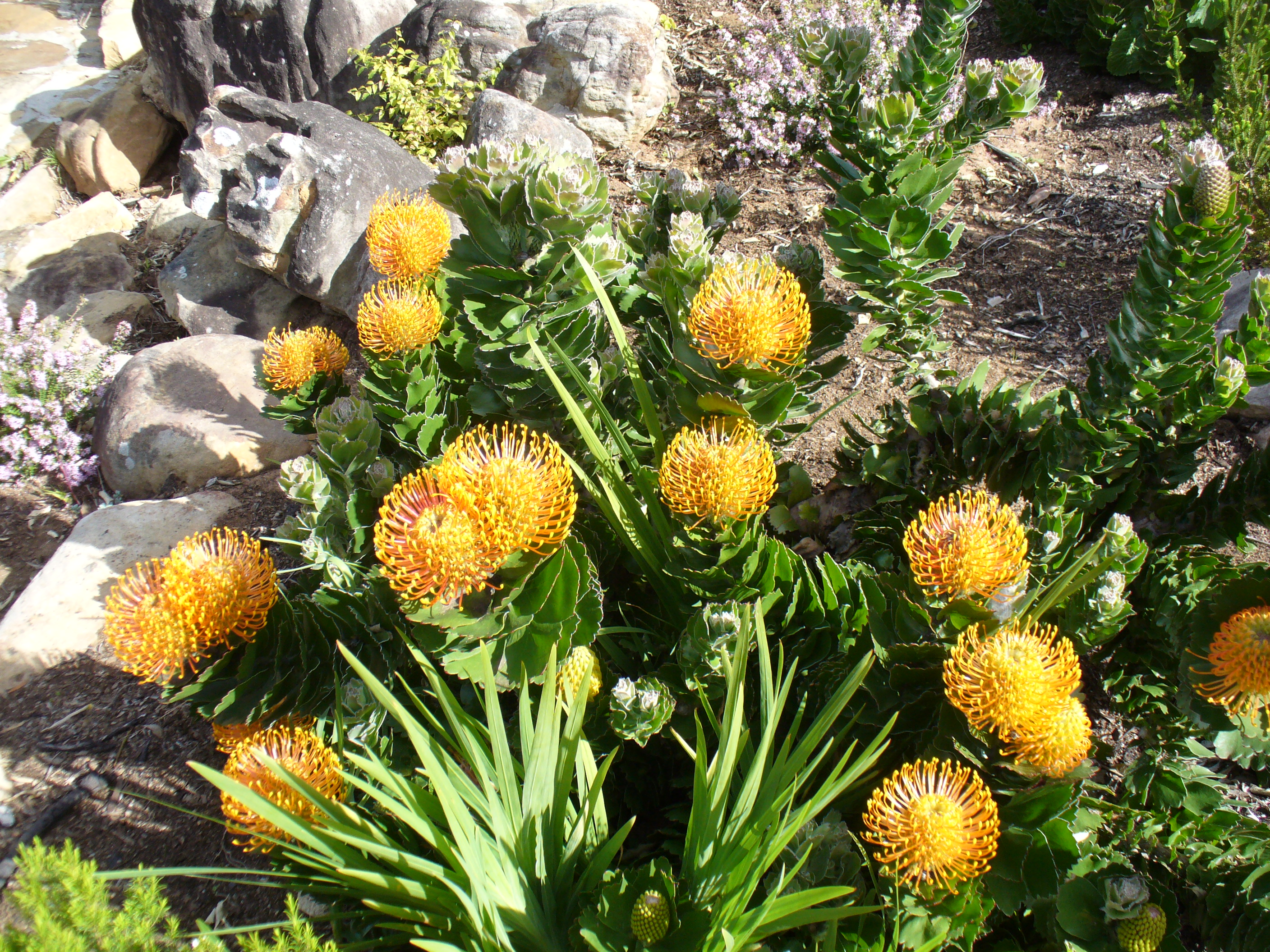 Paterson's leucospermum Kirstenbosch Gardens